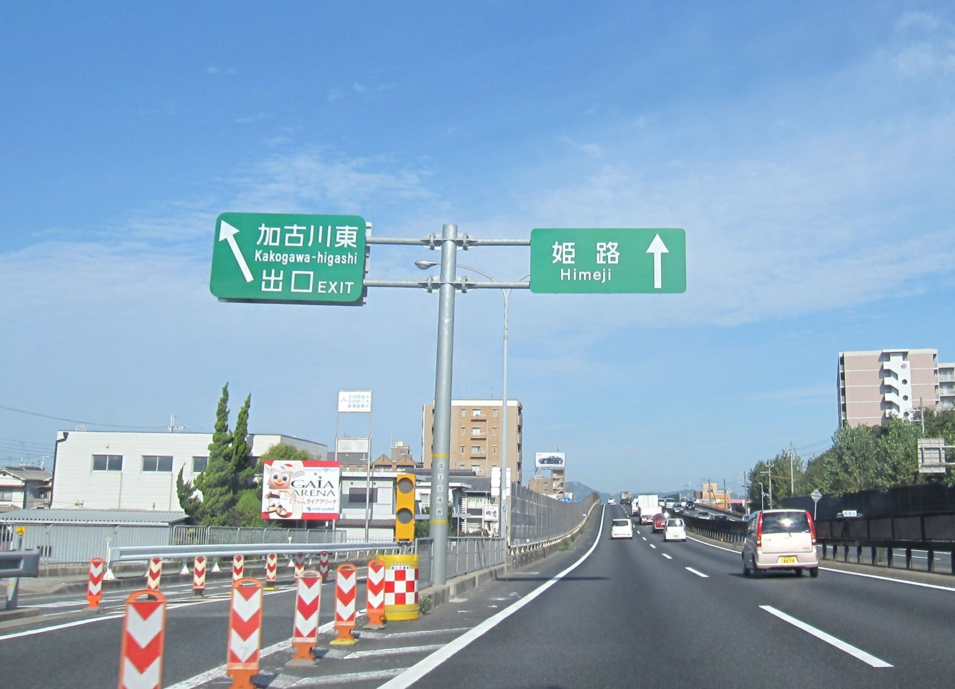 加古川東ランプ案内板